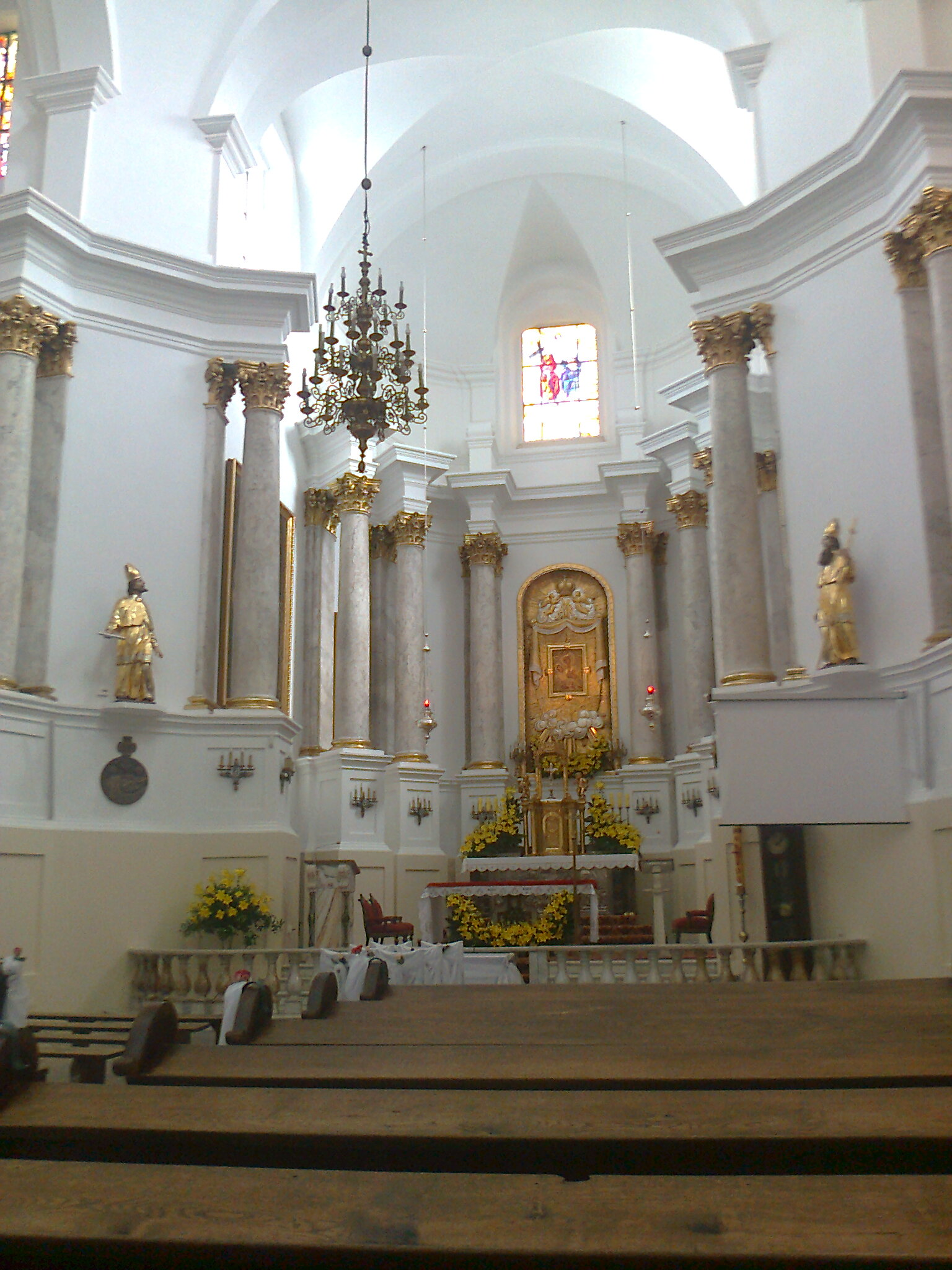 Wnętrze bazyliki Narodzenia NMP w Chełmie